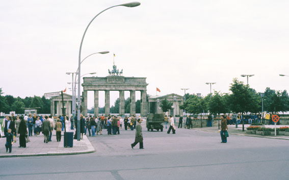 Brandenburger Tor, Berlin (DDR) Besucher an der Ostseite des Brandenburger Tores auf dem Pariser Platz